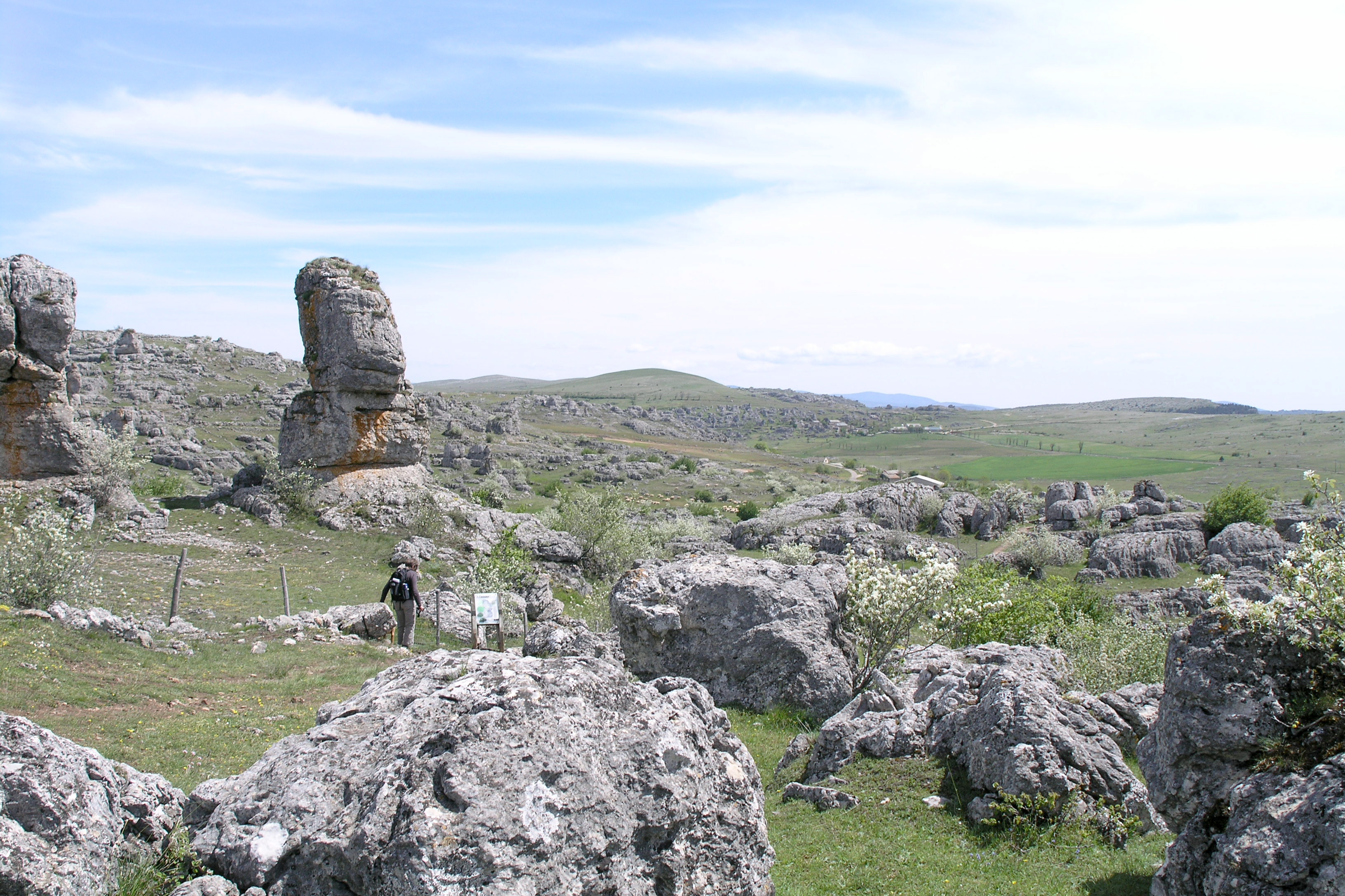 Nîmes-le-vieux Cévennes France own work 23 May 2006 Debs